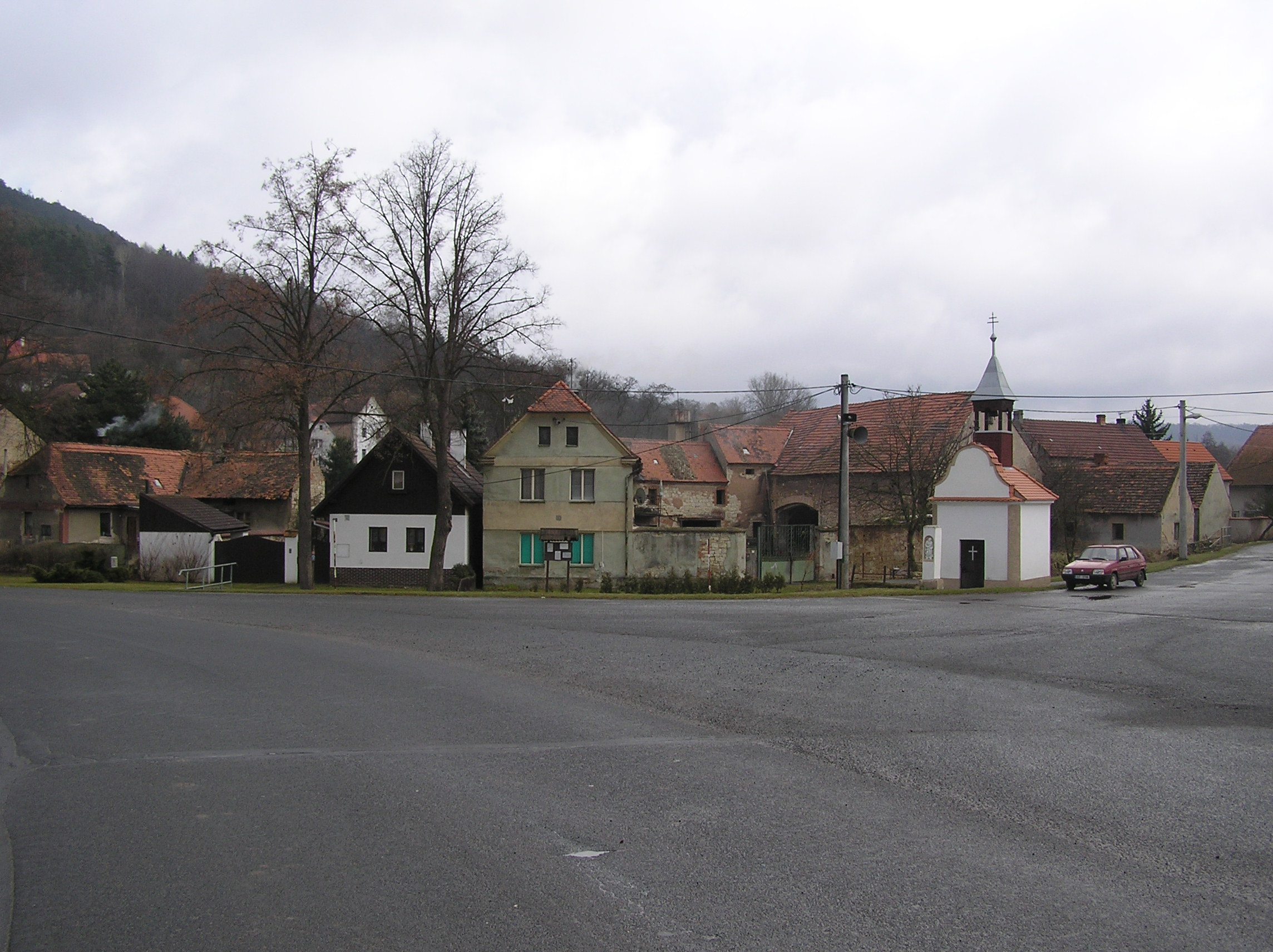 Konětopy - náves, okr. Louny